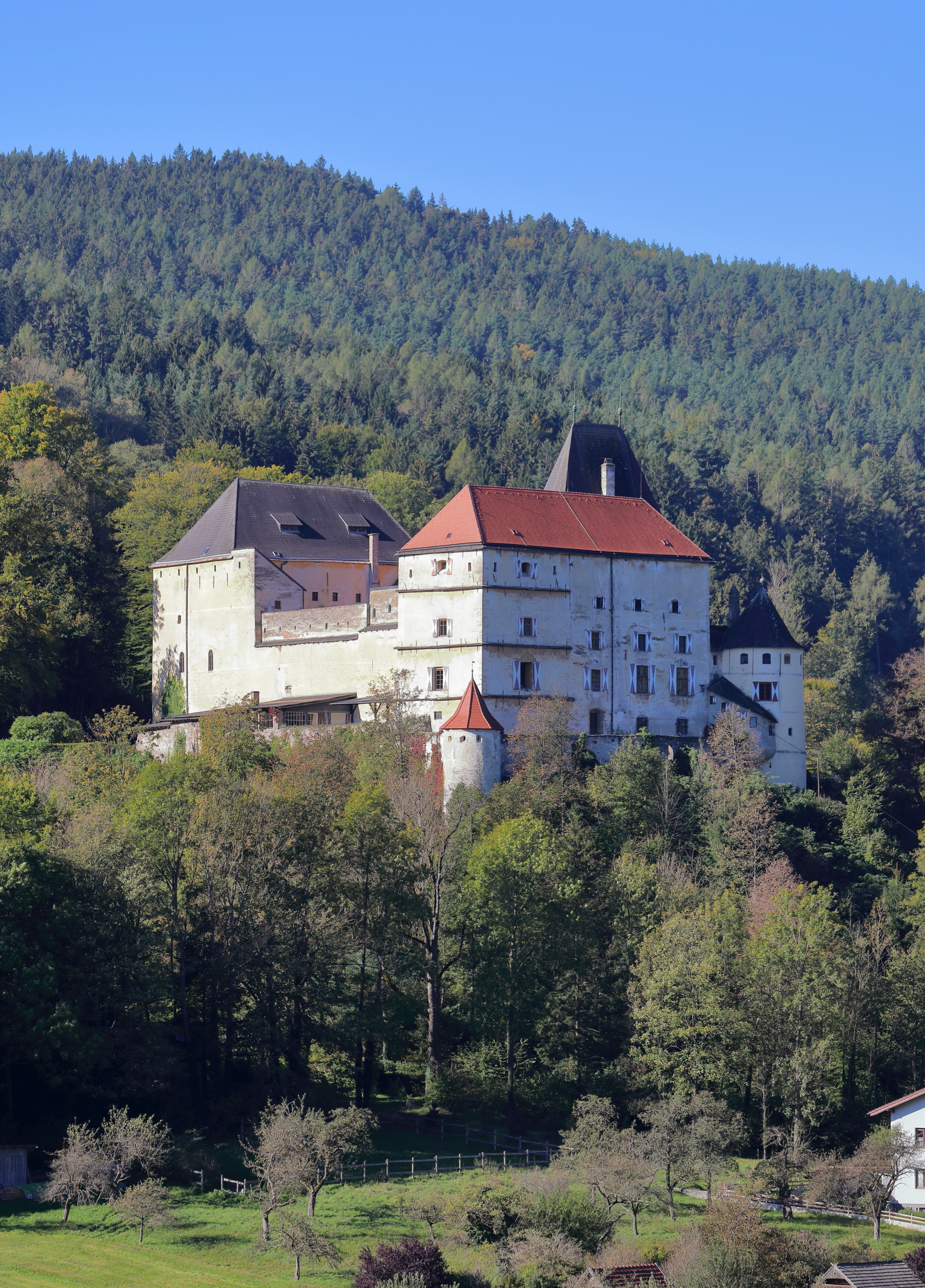 Nordostansicht der Burg in der niederösterreichischen Gemeinde Feistritz am Wechsel.Die Burg, südöstlich über dem Ort gelegen, wurde vermutlich im 12. Jahrhundert errichtet. Um 1500 fand ein spätgotischer Umbau bzw. eine Erweiterung statt. Ein weiterer großzügiger Umbau erfolgte ab 1685. 1815 kam die Anlage in den Besitz von Josef Dietrich (1780–1855), Freiherr von Dietrichsberg, der sie im Stil der Romantik erneuerte und ihr im Wesentlichen das heutige Erscheinungsbild gab, wobei der Torturm erst 1922/24 aufgestockt wurde.